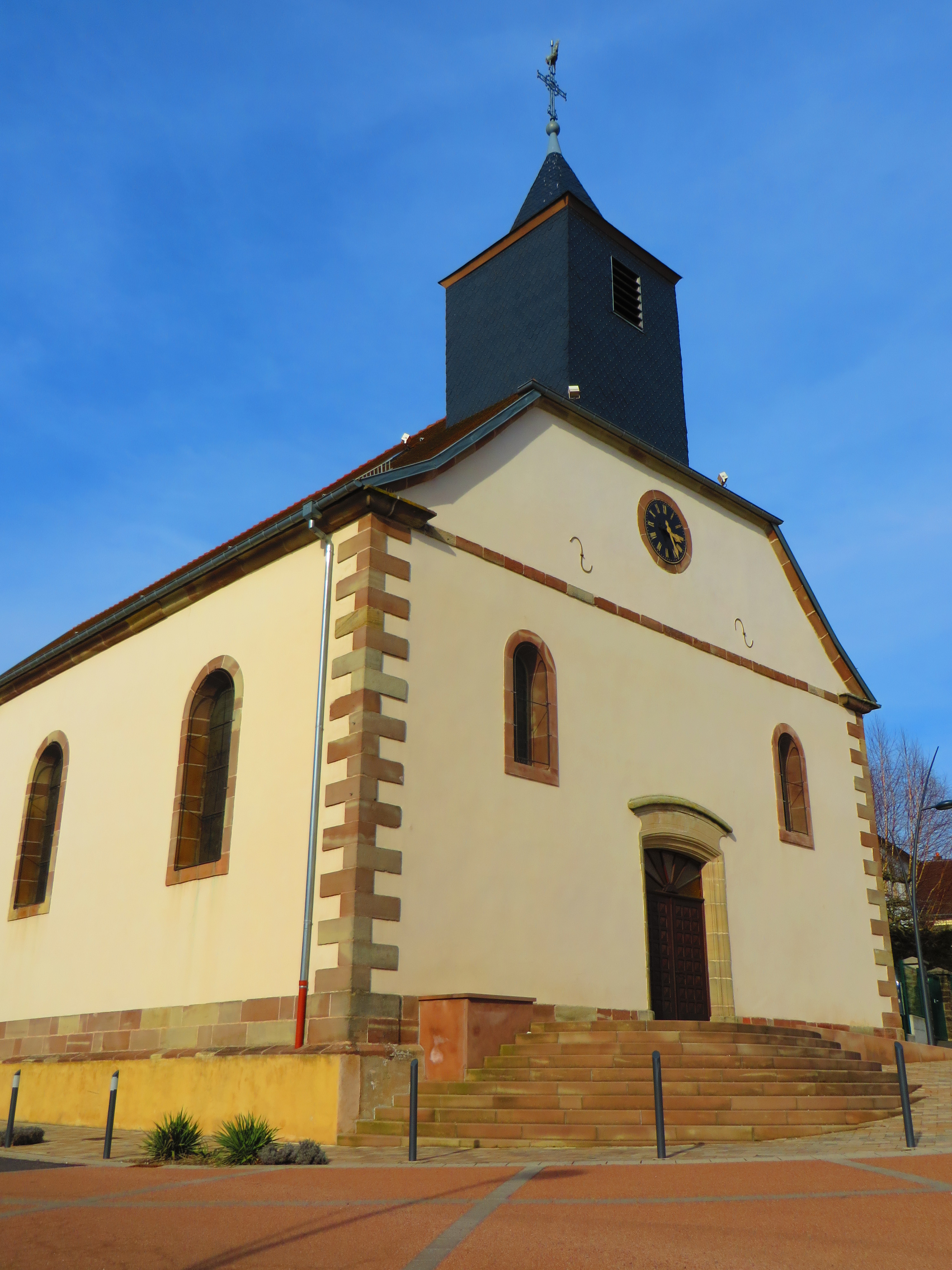 Buhl Lorraine eglise